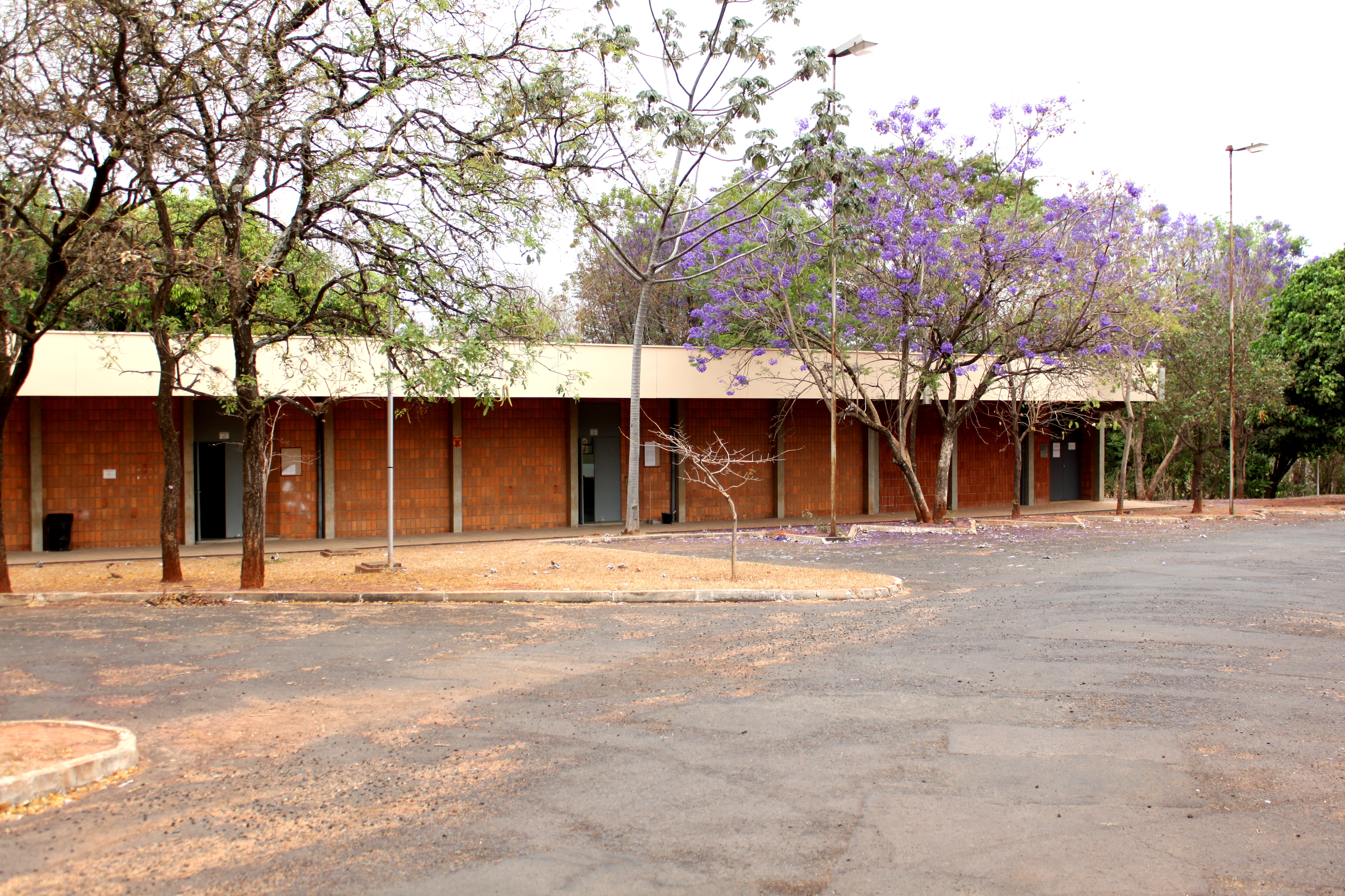 Bloco C - IBILCE - UNESP - Sao Jose do Rio Preto - SP